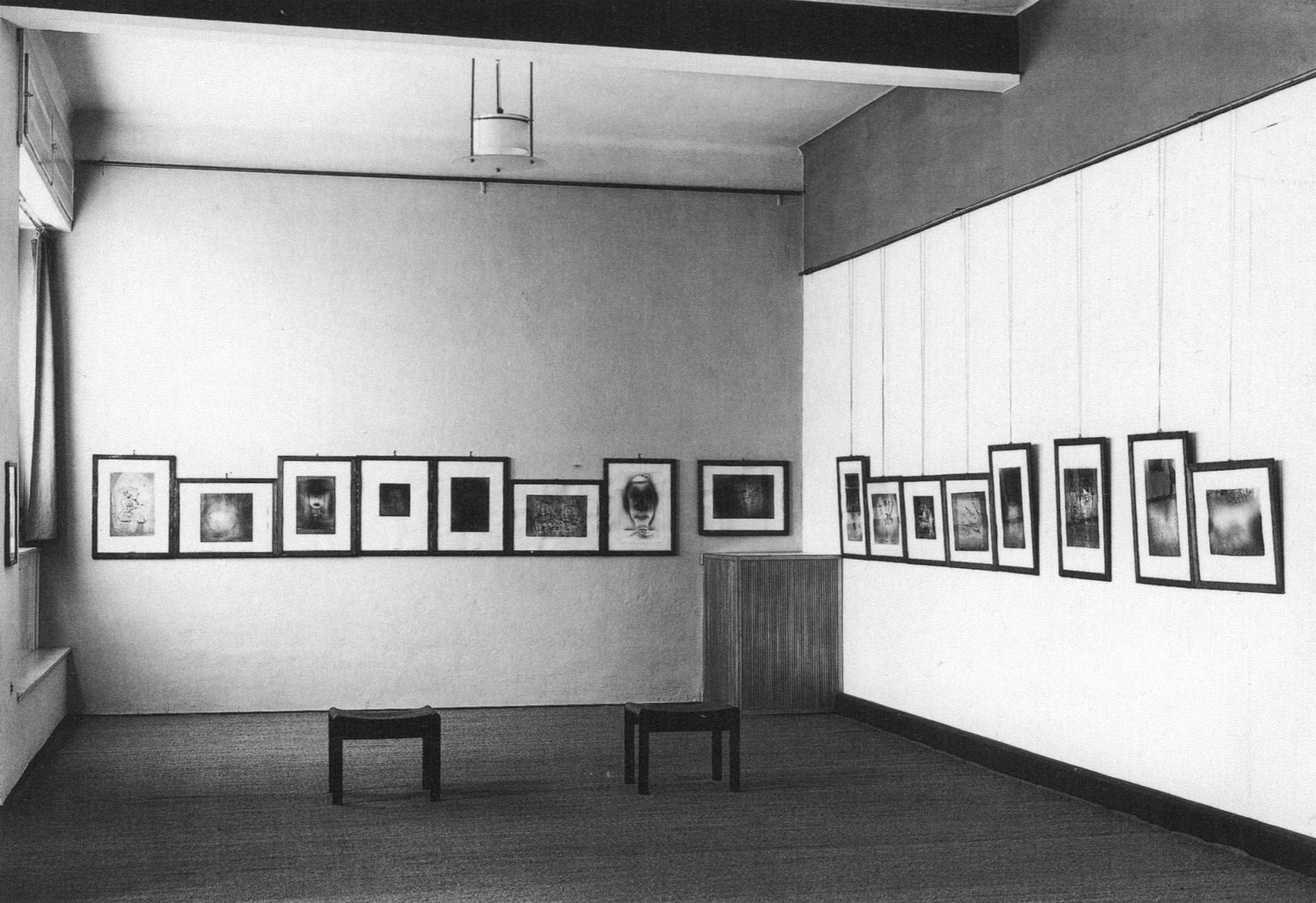 Ausstellung von Paul Klee im Juni 1926 in der Galerie Neue Kunst Fides in Dresden. Die Ausstellungsräume wurden von Hinnerk Scheper, dem damligen Leiter der Werkstatt für Wandmalerei im Bauhaus in Dessau, gestaltet.